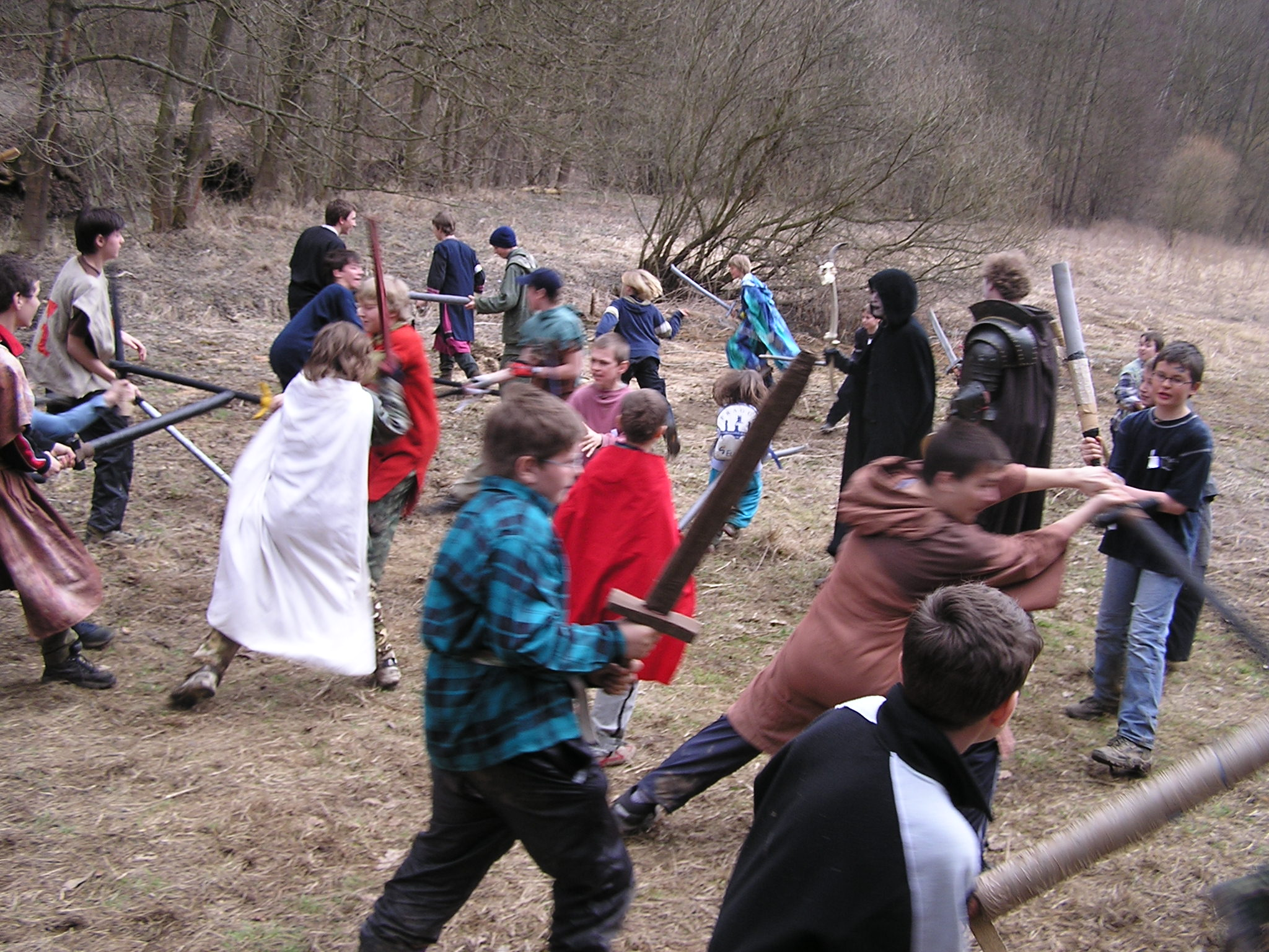 Dřevárna- hromadný boj